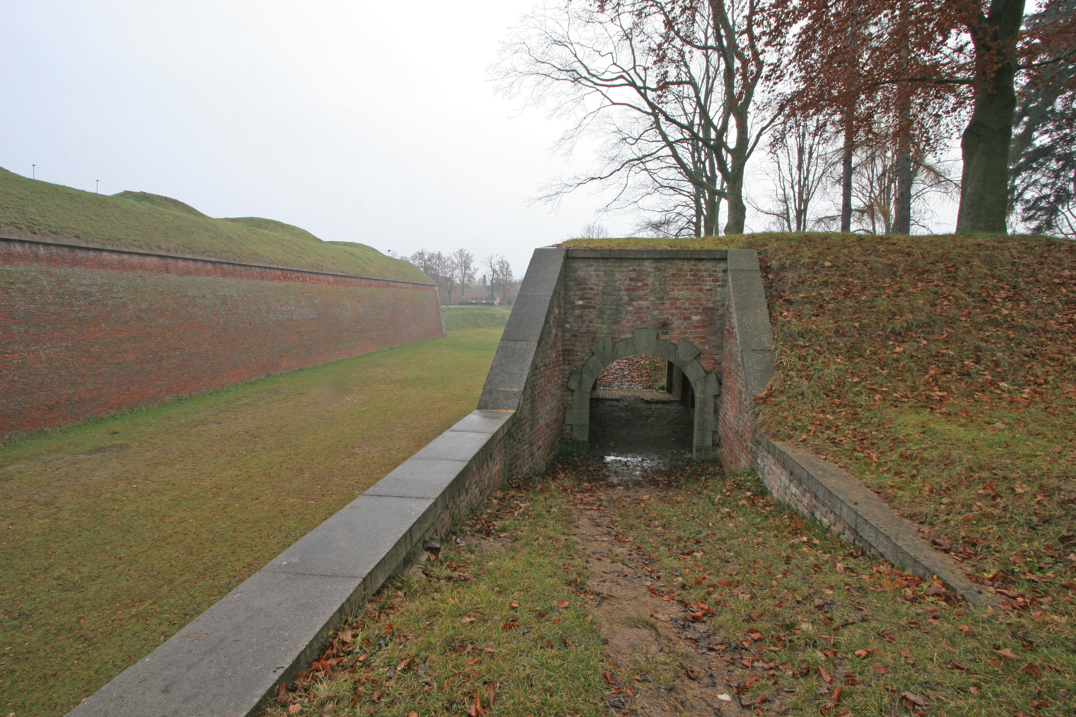 Poterna dutého traverzu ústící do shromaždiště No. XXX, Horní pevnost (Josefov), Josefov